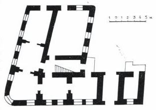 Плад дома па Ленінскай вуліцы, 7 (Магілёў)